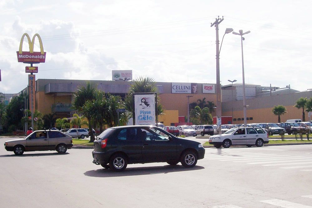 Avenida Rio Verde, Foto de Aparecida.